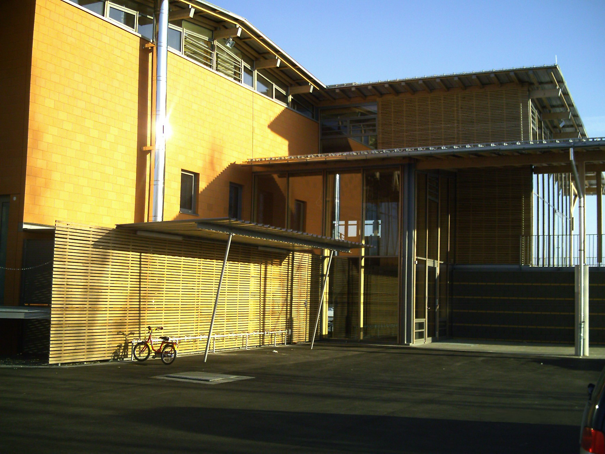 Sporthalle in Hawangen, Landkreis Unterallgäu